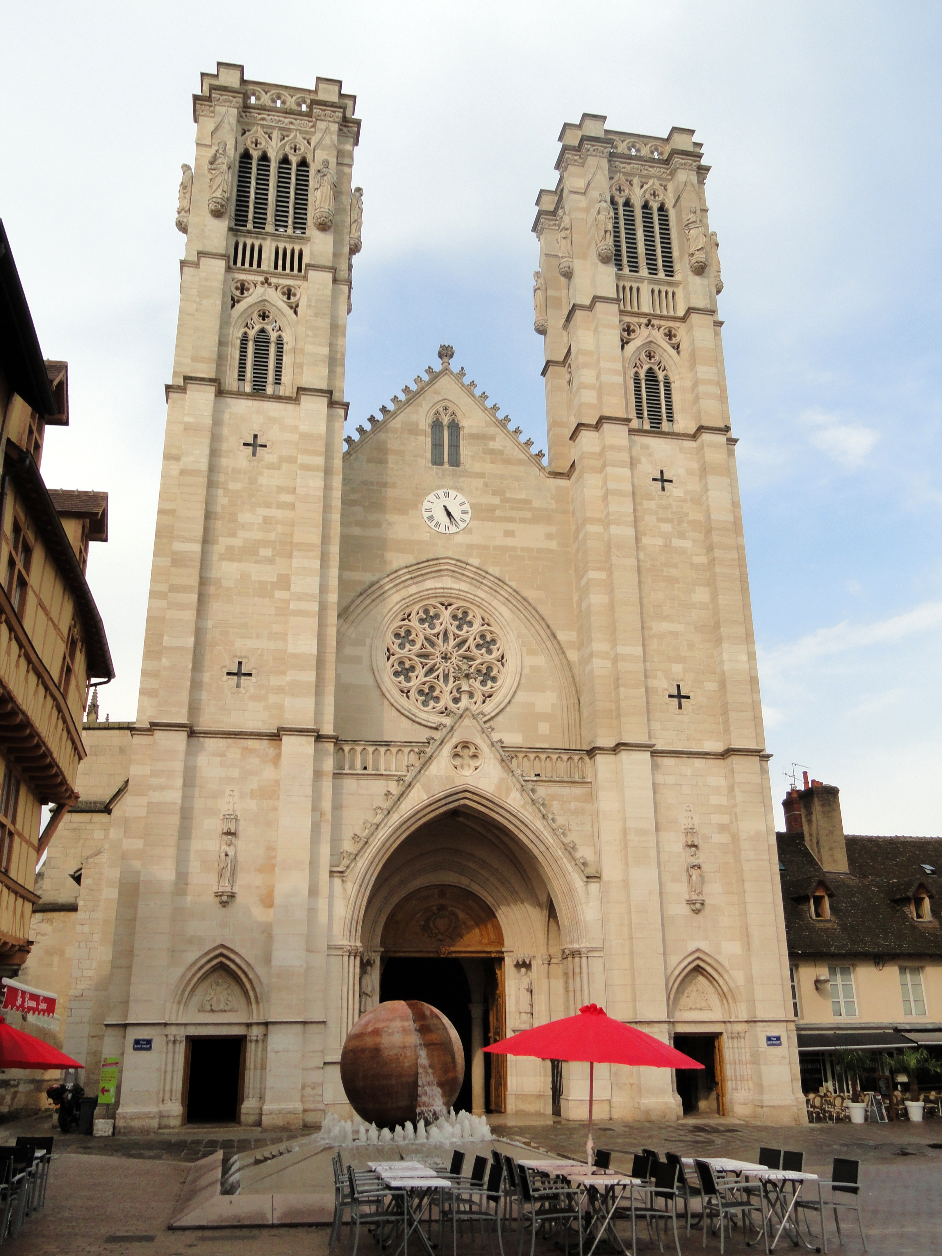 Cathédrale Saint-Vincent de Chalon-sur-Saône, Chalon-sur-Saône, Saône-et-Loire, France.